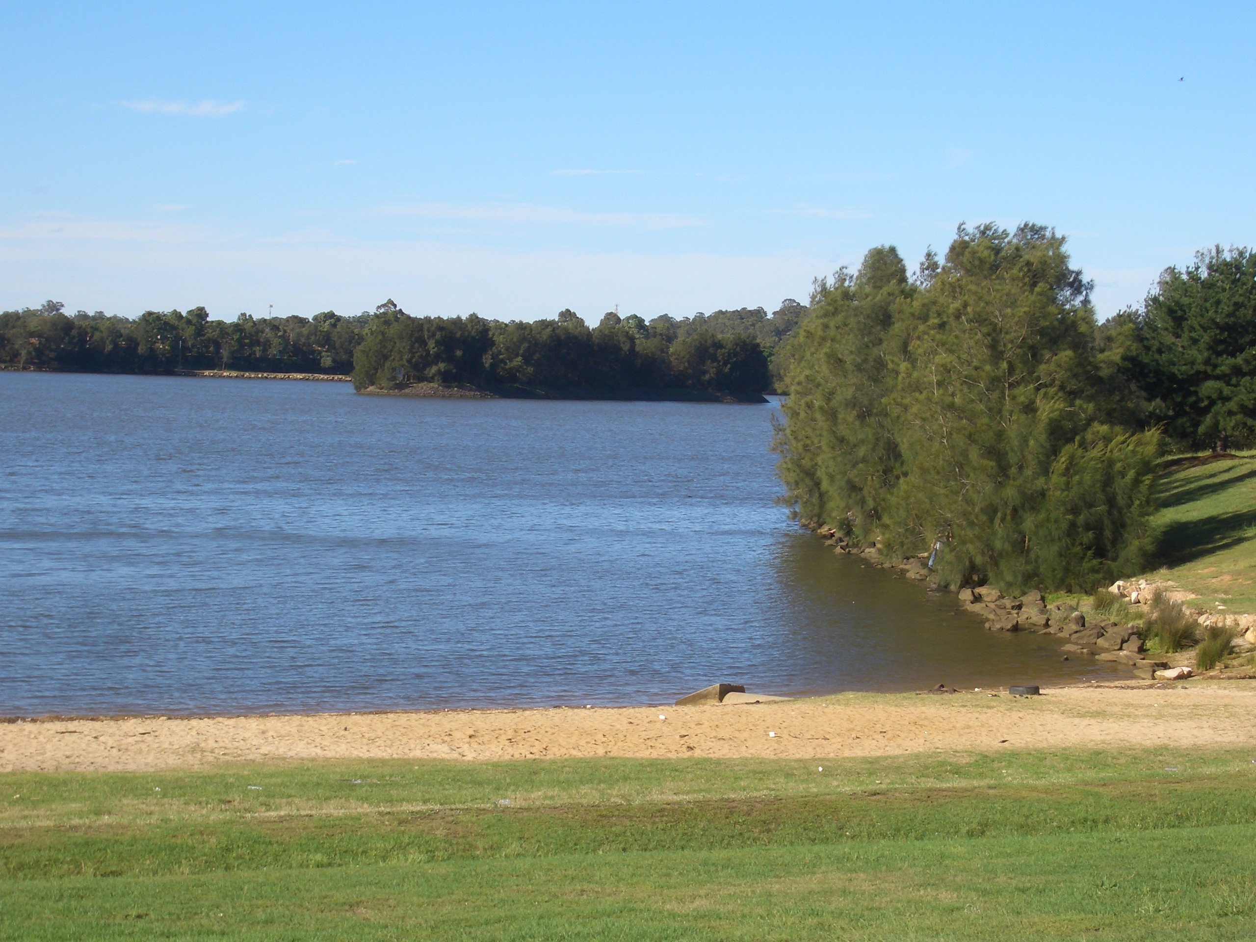 Chipping Norton Lake